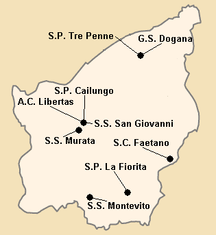 Répartition des clubs en Serie A1 1986-1987.